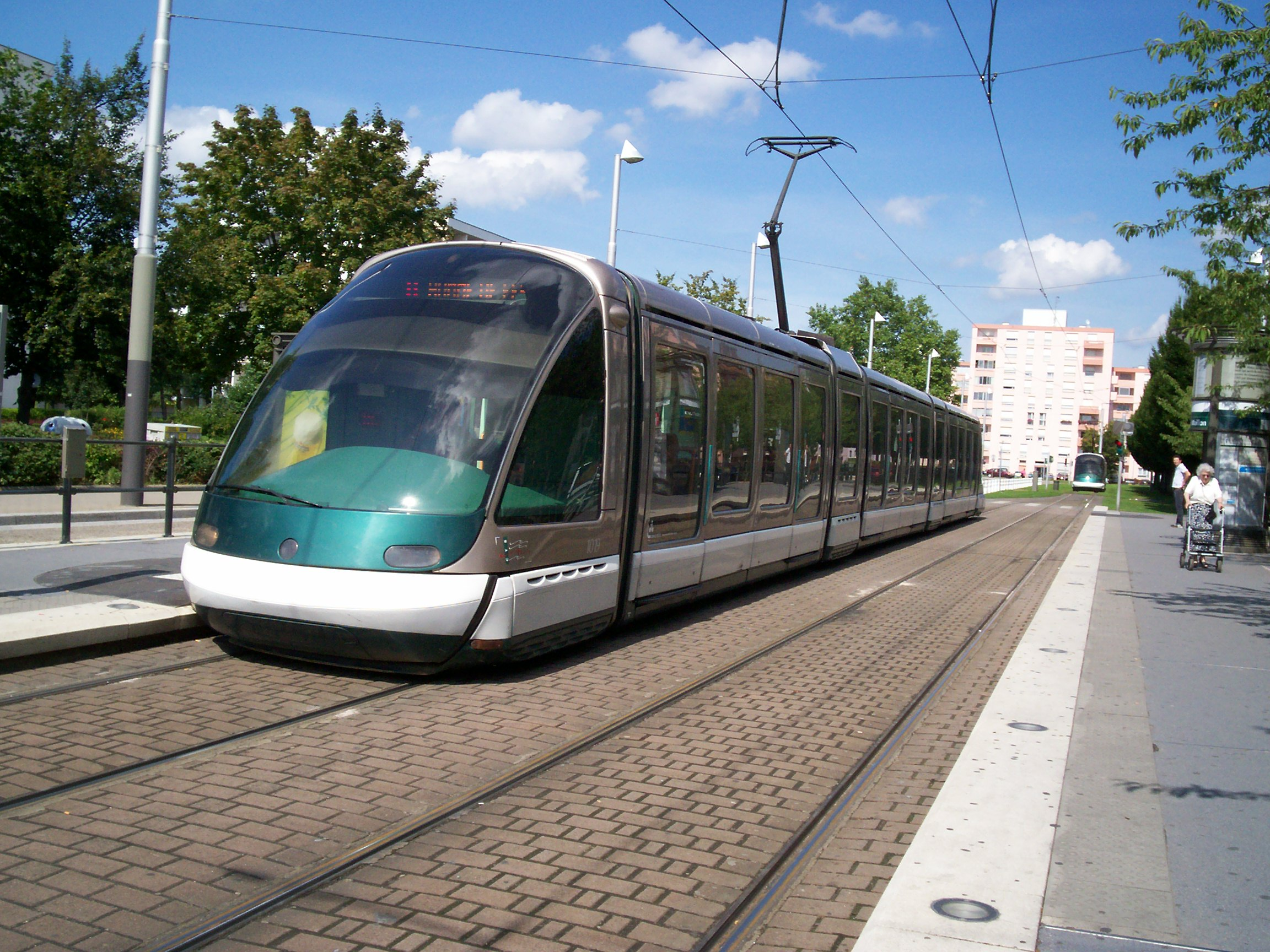 Tramway de Strasbourg